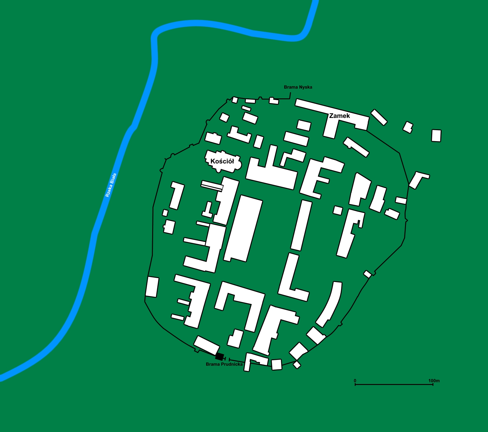 Plan średniowiecznej Białej